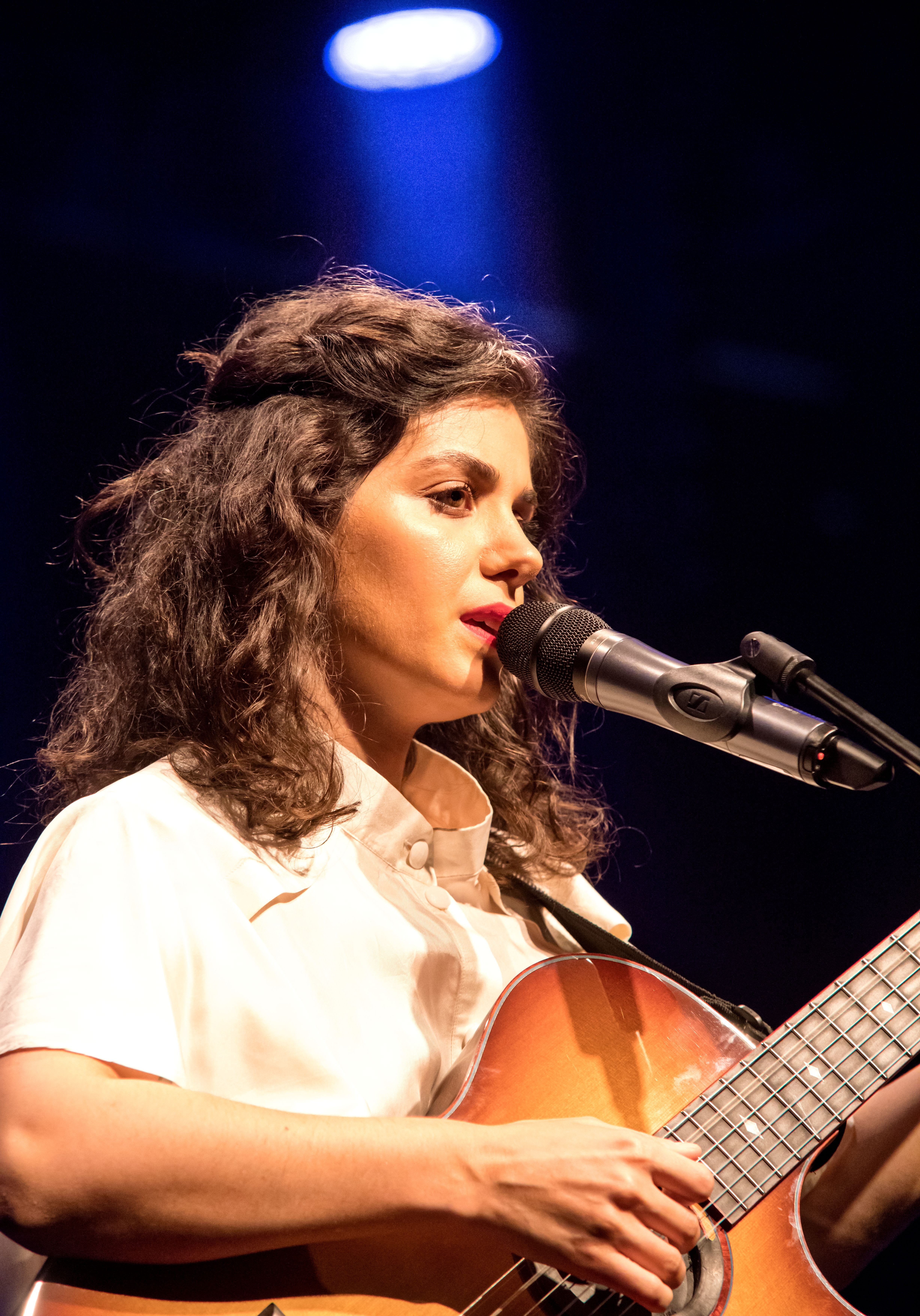 Bilder vom Zelt Musik Festival 2016 in Freiburg im Breisgau Katie Melua